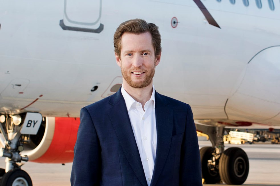 Portrait von Alexis von Hoensbroech vor einem A320 der Austrian Airlines am Flughafen Wien